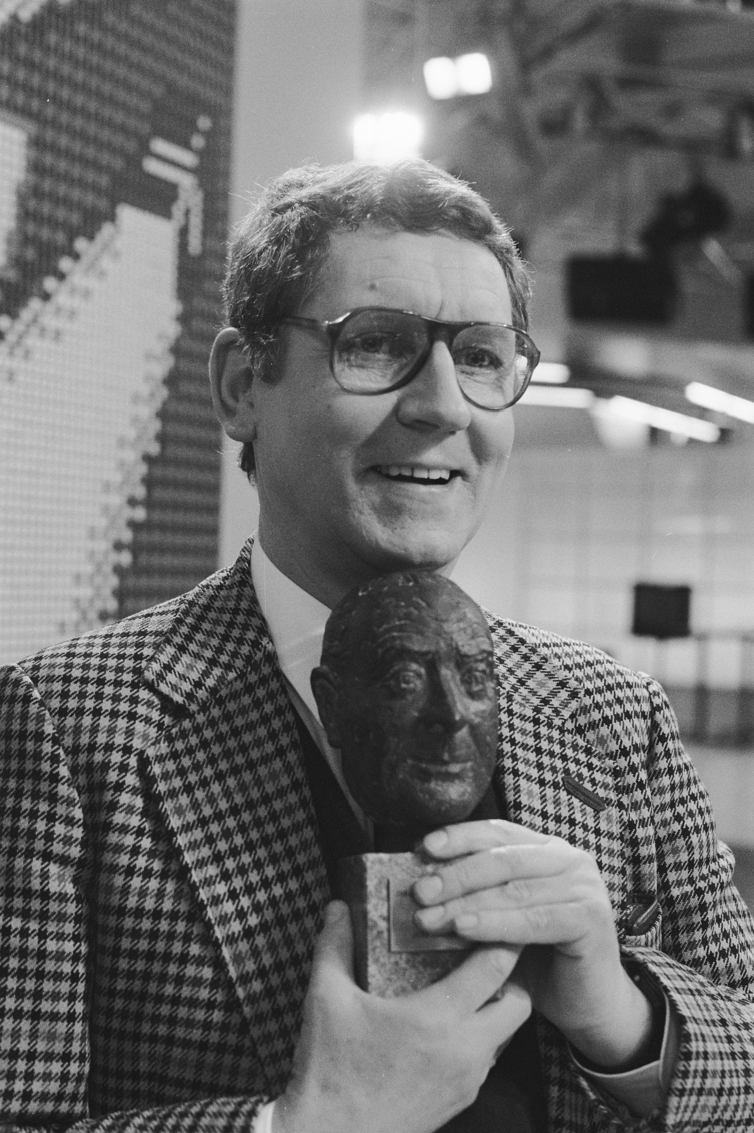 Collectie / Archief : Fotocollectie Anefo Reportage / Serie : [ onbekend ] Beschrijving : Johan Kaartprijs uitgereikt aan John Lantink in Amsterdam; John Lantink met de prijs Datum : 9 februari 1988 Locatie : Amsterdam, Noord-Holland Trefwoorden : prijzen, uitreikingen Persoonsnaam : John Lantink Fotograaf : Croes, Rob C. / Anefo Auteursrechthebbende : Nationaal Archief Materiaalsoort : Negatief (zwart/wit) Nummer archiefinventaris : bekijk toegang 2.24.01.05 Bestanddeelnummer : 934-1863